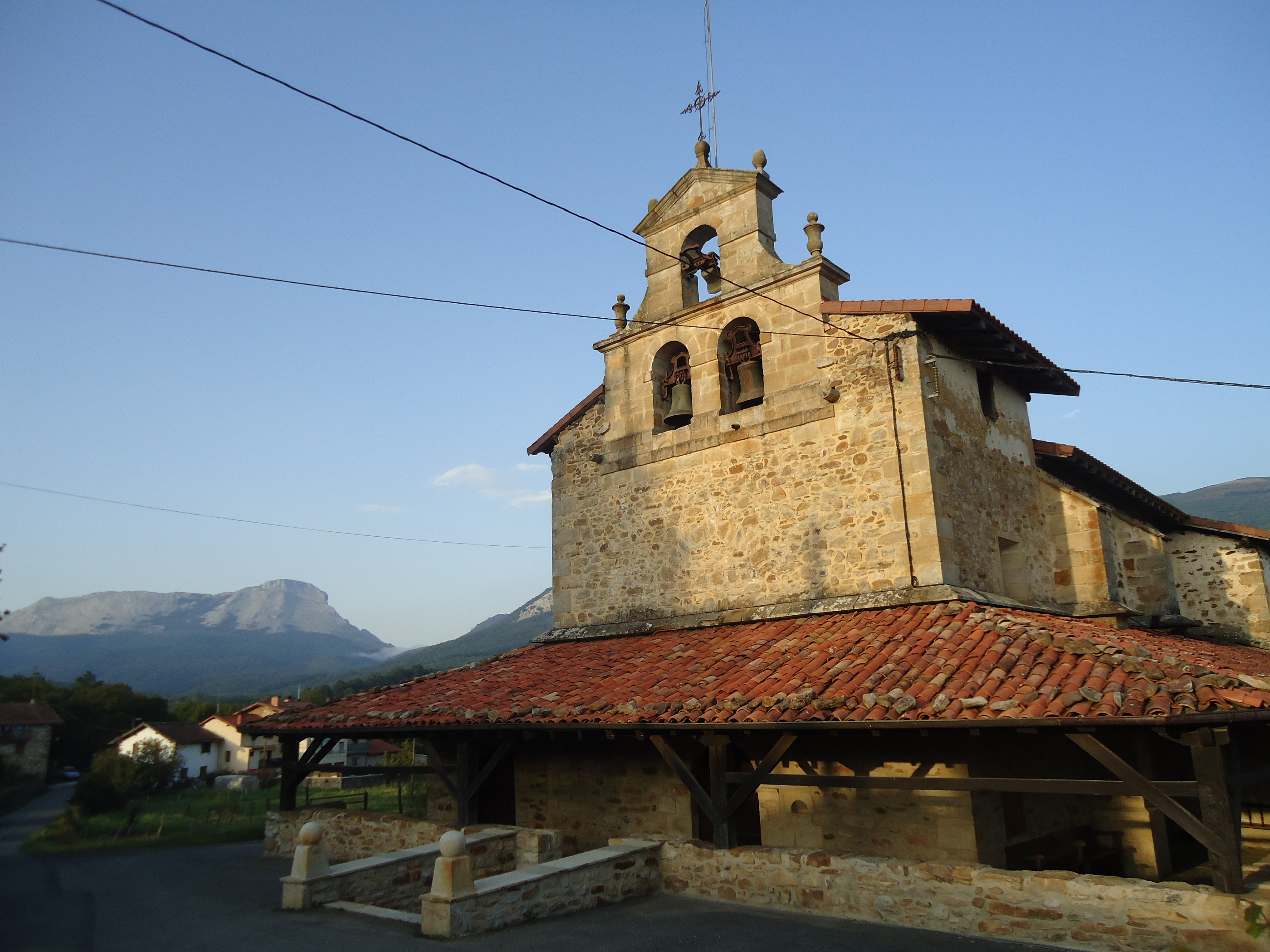 Oleta auzoko eliza hurbiletik (Aramaio, Araba)